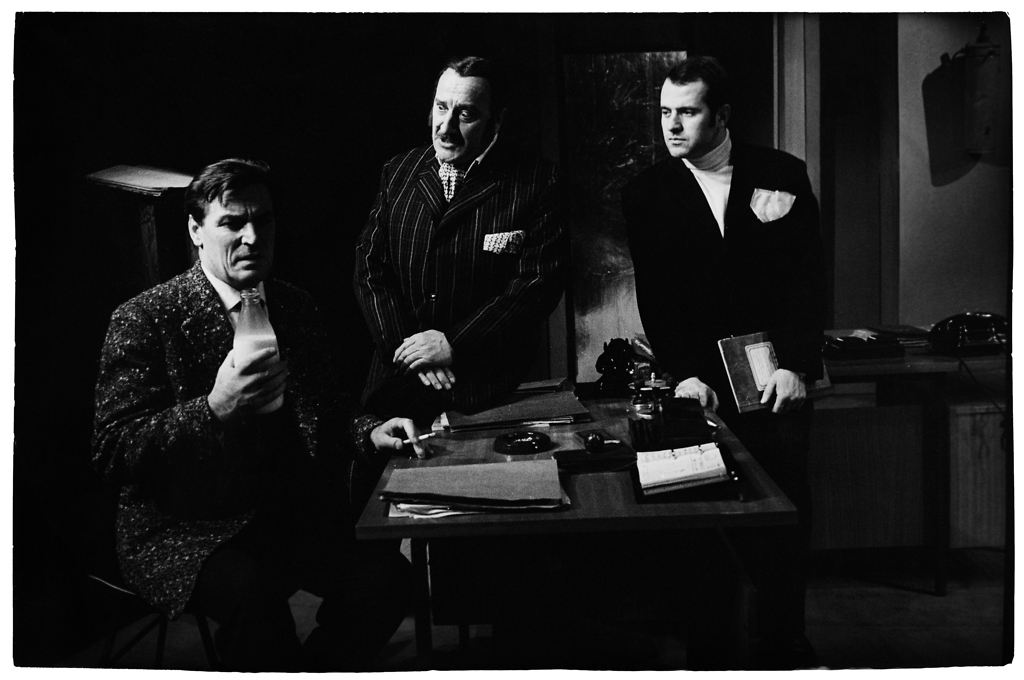 Václav Havel, Obvestilo, Drama SNG v Ljubljani. Na fotografiji: Janez Hočevar (Václav Hubš), Bert Sotlar (Josef Gross) in France Presetnik (Jan Baláš).